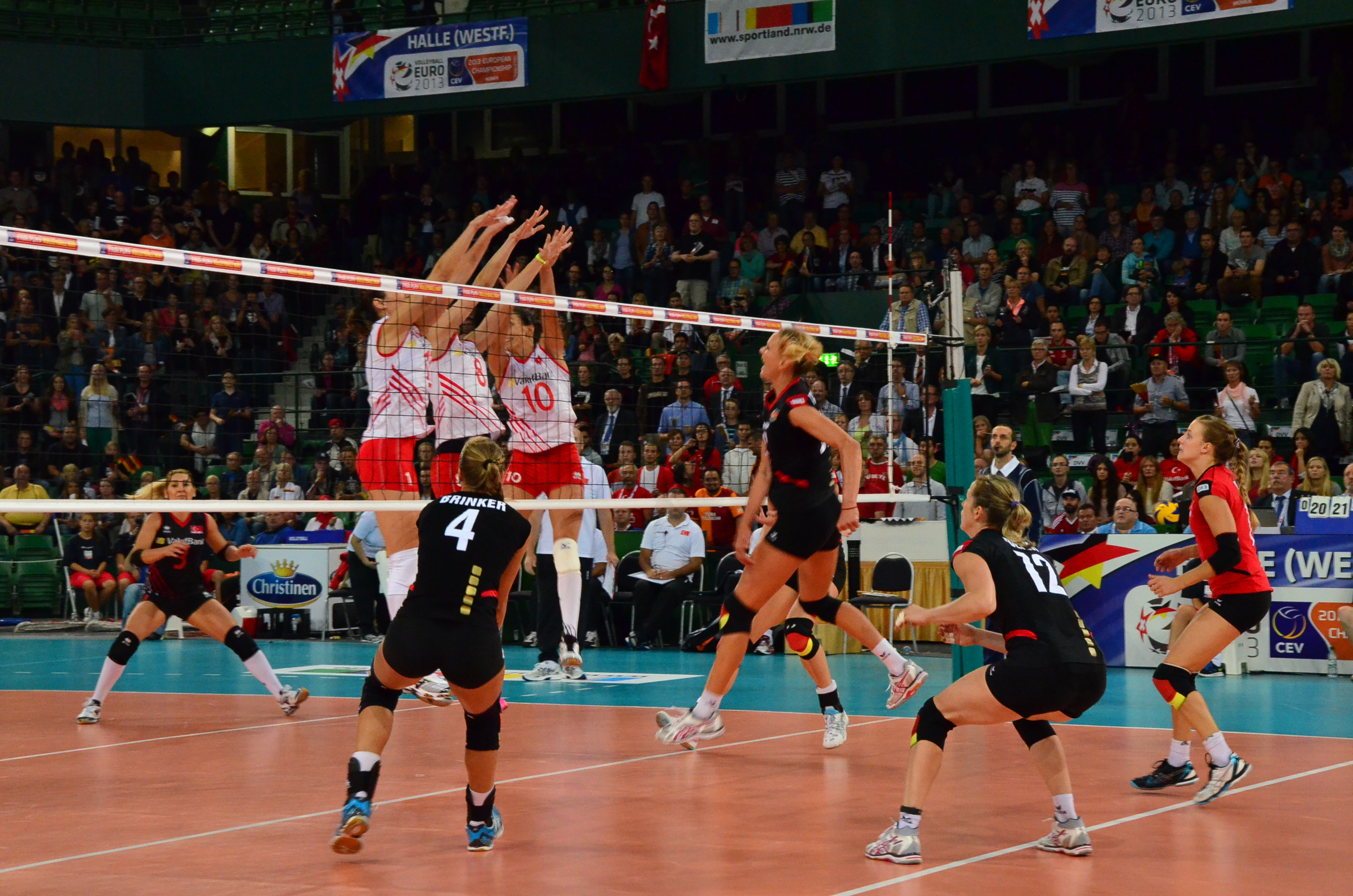 Volleyball-Europameisterschaft der Frauen 2013-Spielort Halle (Westf) Gerry-Weber-Stadion - Spiel 8. September 2013 (Deutschland-Türkei)